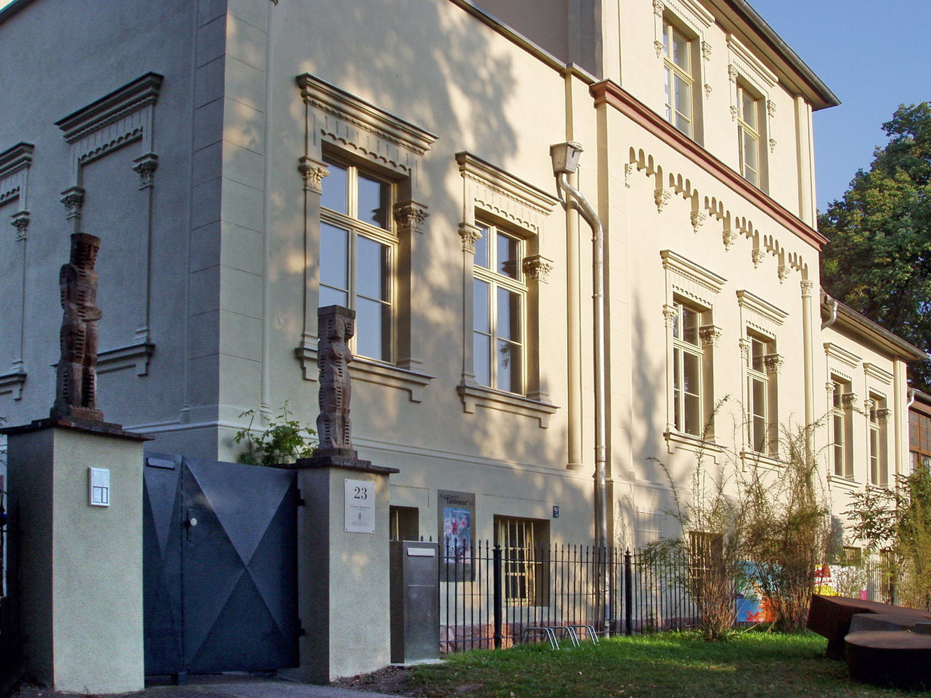 Fassade des Gebäudes Kunstverein Talstrasse Halle